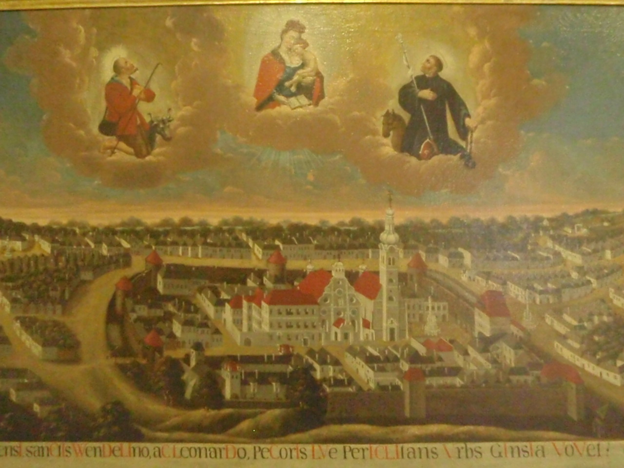 Blick von Kőszeg, 1746, Teilabschnitt